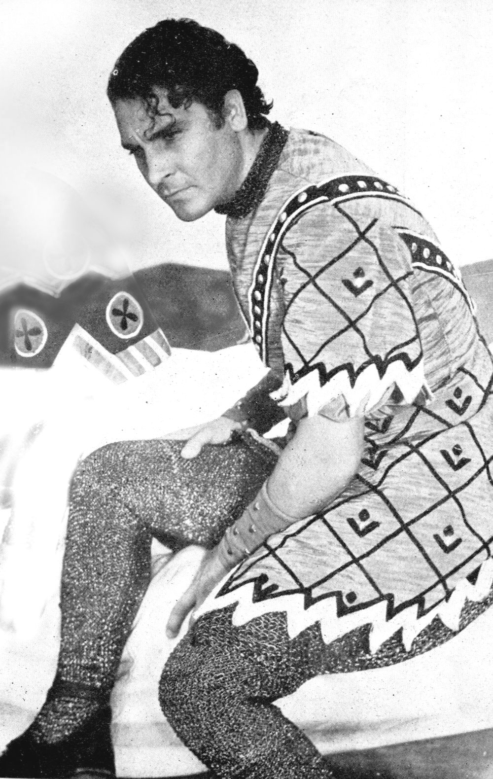 Marcello Spada in Bertoldo, Bertoldino e Cacasenno (Simonelli, 1935)